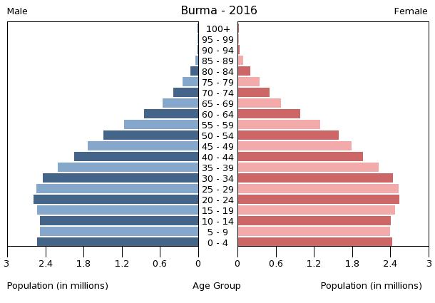 A population pyramid illustrates the age and sex structure of a country's population and may provide insights about political and social stability, as well as economic development. The population is distributed along the horizontal axis, with males shown on the left and females on the right. The male and female populations are broken down into 5-year age groups represented as horizontal bars along the vertical axis, with the youngest age groups at the bottom and the oldest at the top. The shape of the population pyramid gradually evolves over time based on fertility, mortality, and international migration trends.